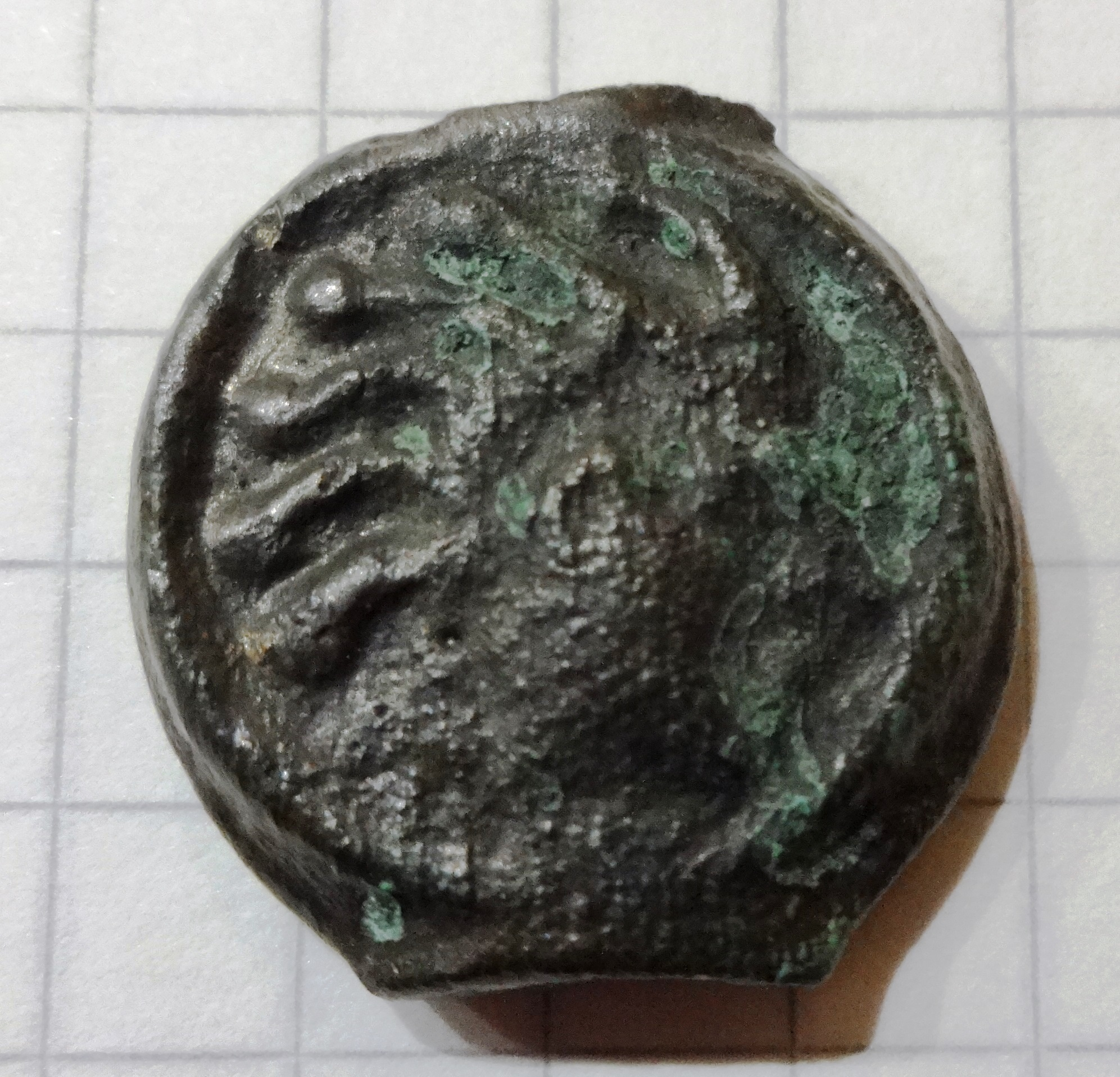 Potinmünze der Senones mit Kopf, ca. 50 v. Chr.